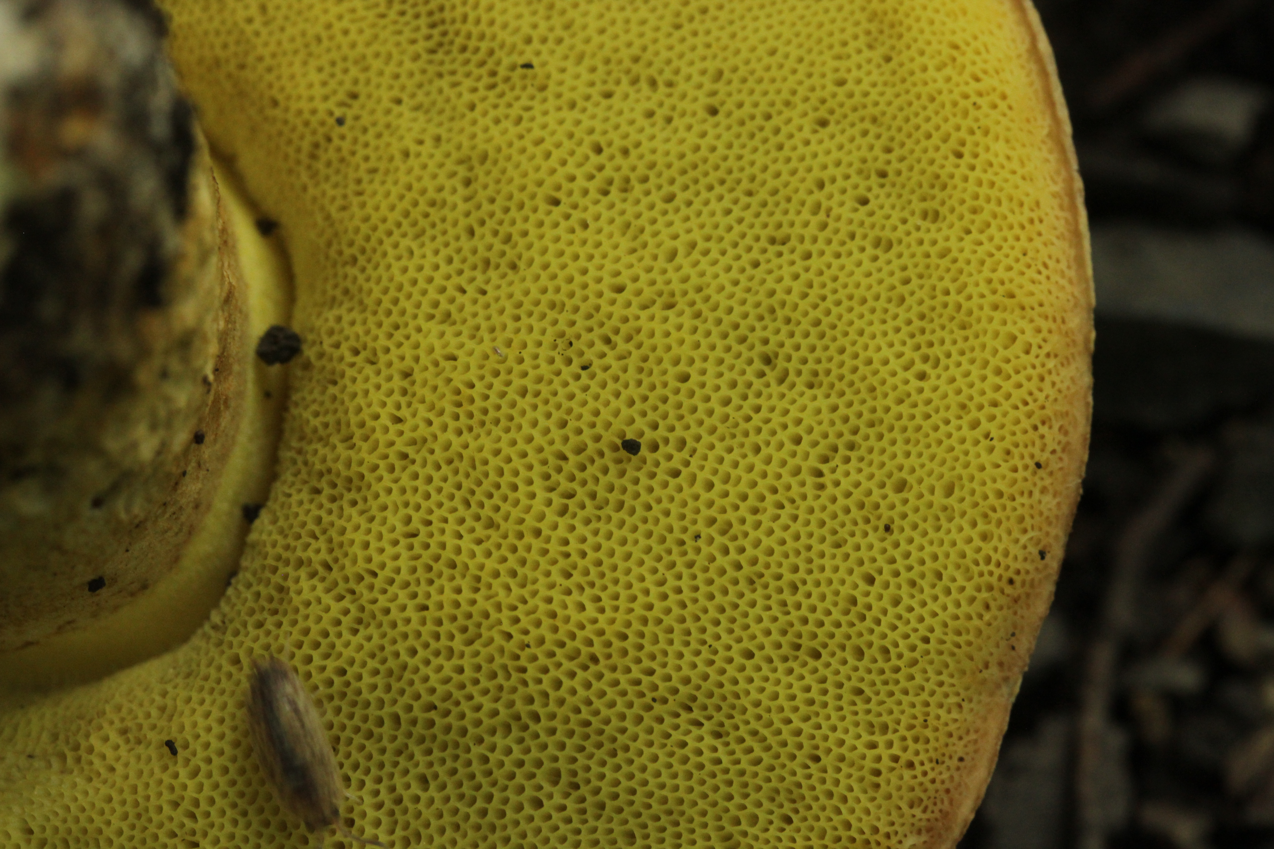 Iodine Bolete - Hemileccinum impolitum